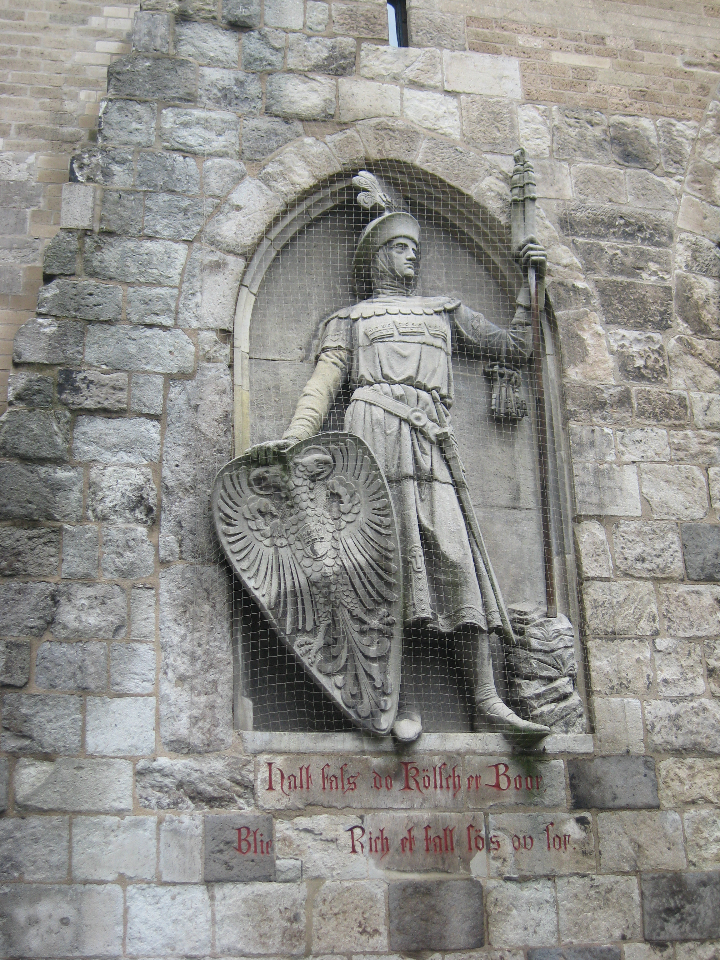 Der "kölsche Boor" (Denkmalreplik), Köln (Eigelsteintorburg) Datum: 12.02.2011 Urheber M. Pfeiffer alias Benutzer:Gordito1869 Quelle: privates Fotoarchiv des Urhebers